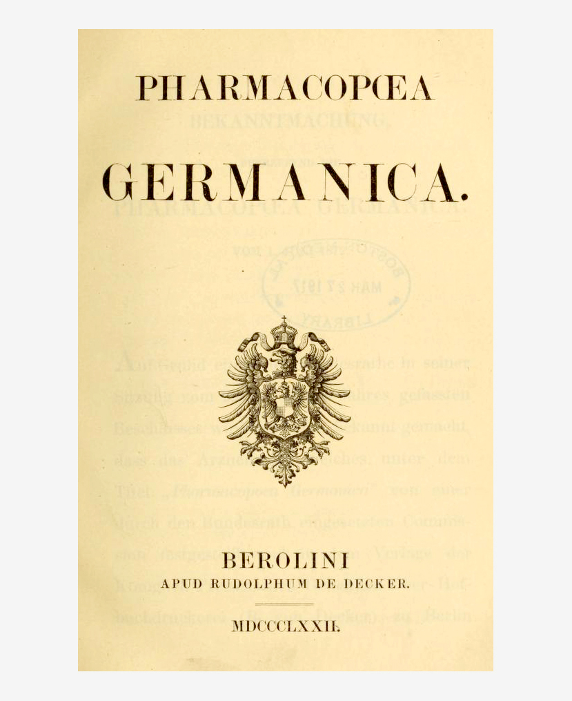 Titelblatt